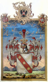 Wappen aus dem Adelsdiplom von Franz II./I. (römisch-deutscher Kaiser 1792-1806, Kaiser von Österreich 1804-1835) für Joseph Johann Maria Weissegger (1755-1817), seit 1797 Rektor der Universität Freiburg im Breisgau, mit Verleihung des Prädikates "von Weißeneck". Ausgestellt Wien, 9. Oktober 1804, mit eigenhändiger Unterschrift des Kaisers. Pergamentlibell, teils goldgehöhte Kalligraphie, teilweise gedruckte Bordüre, farbige Wappendarstellung. Samteinband, anhängendes kaiserliches Siegel.